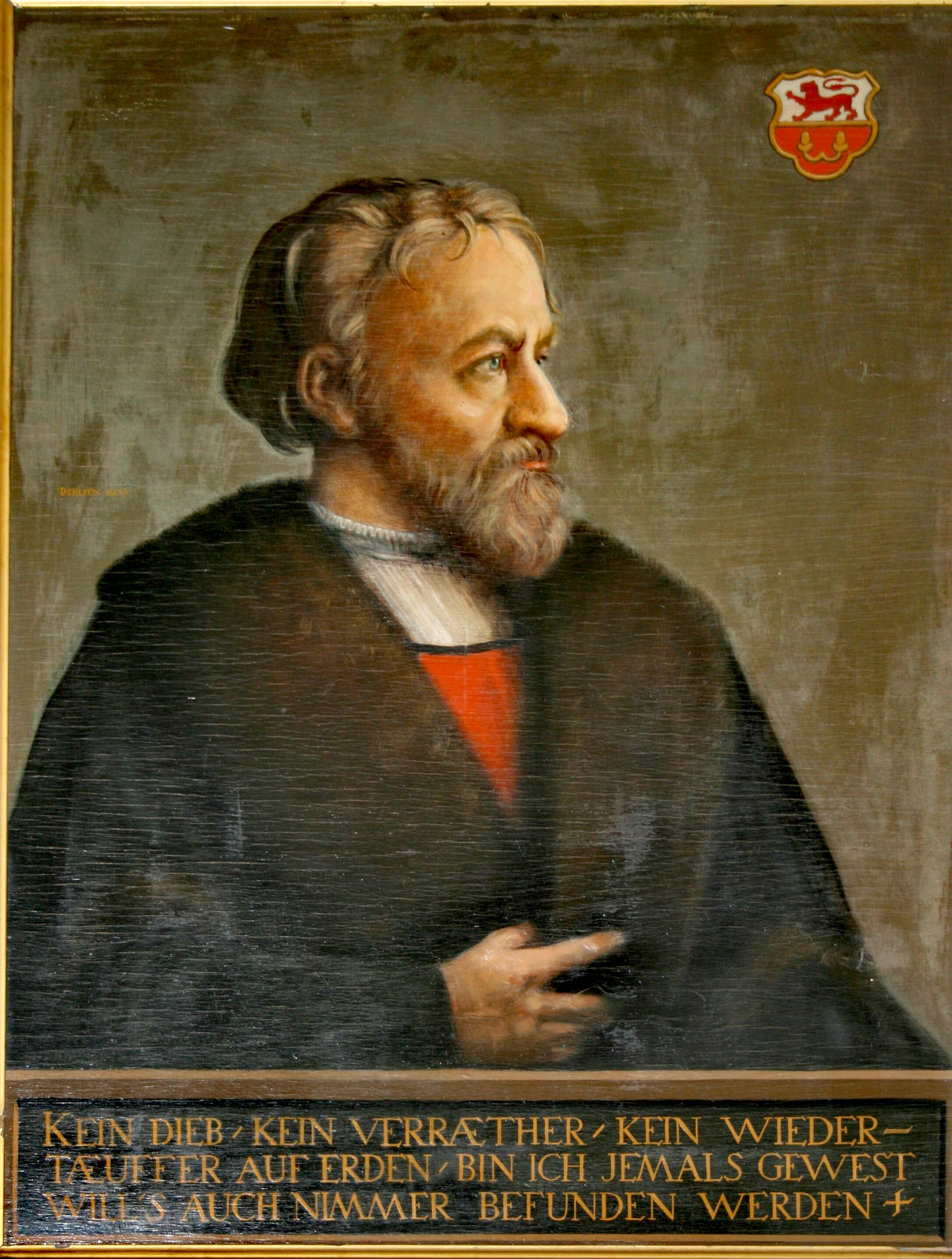 Jürgen Wullenwever (~1480-1537), Bürgermeister von Lübeck, Gemälde aus der Bürgermeistergalerie im Lübecker Rathaus